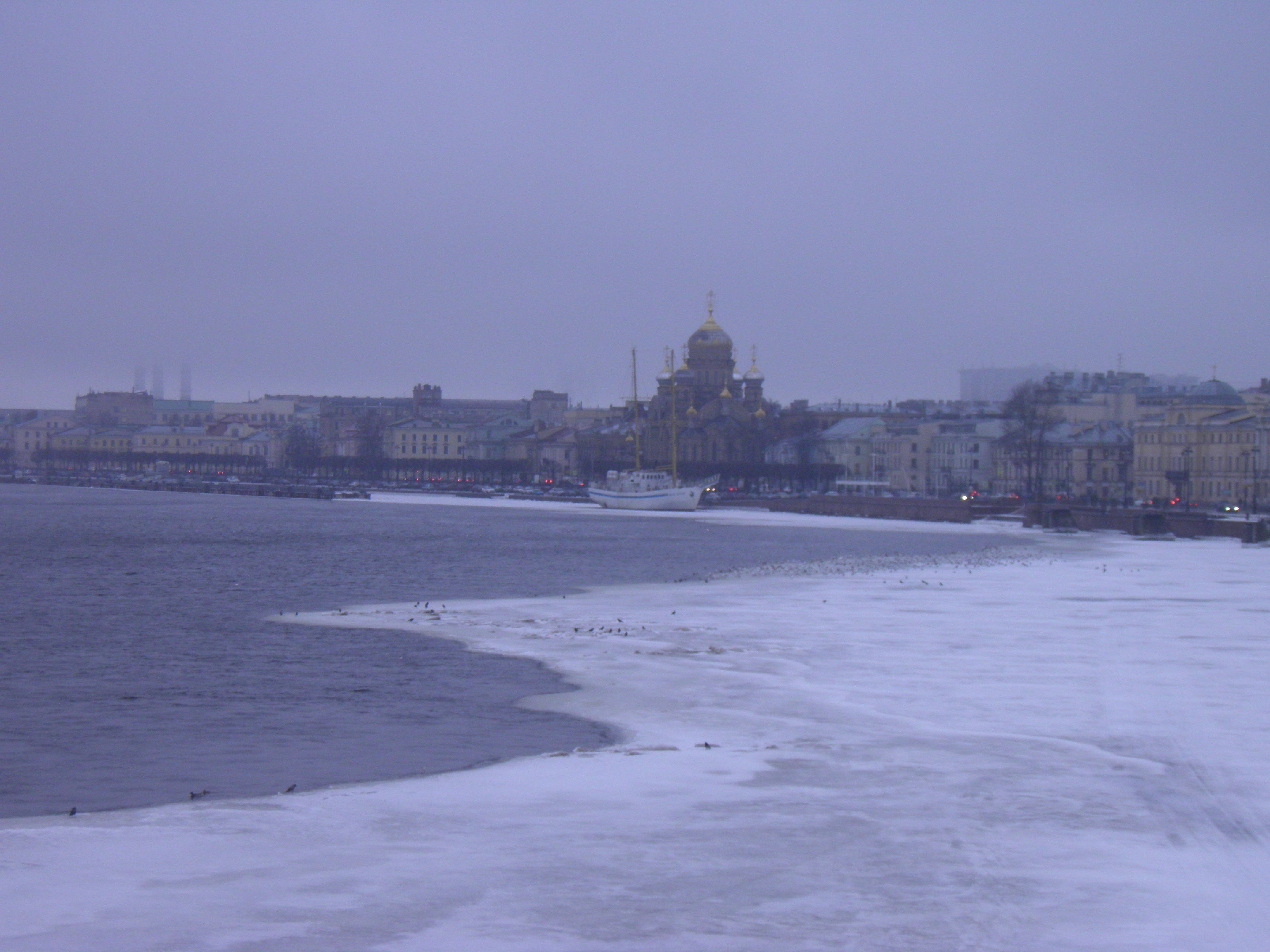 Neva à moitié gelée à Saint-Pétersbourg (Russie).